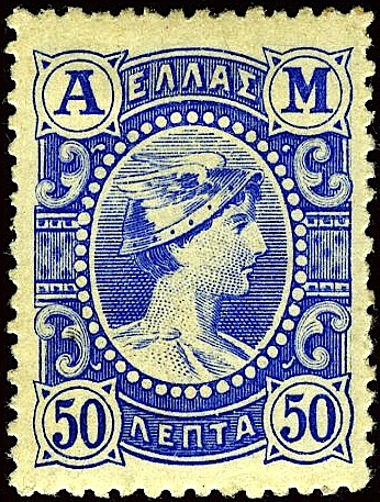 Hermès - AM Axia Metalliki - 50 lepta vendus contre payement en métal (or??) (1902)